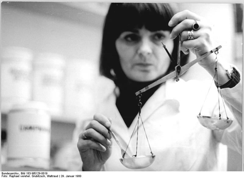 Leipzig, Apothekerin mit Feinwaage ADN-ZB Raphael 29.1.80-se-Leipzig: Ob Dichter Theodor Fontane beim Herstellen eines Medikaments dieselbe Handwaage benutzte wie hier Apothekenassistentin Ursula Guthke? Er erlernte in der Leipziger Adler-Apotheke vor 140 Jahren den Apothekerberuf. Seit kurzem präsentiert sich die im Jugendstil gehaltene Apotheke in der Leipziger Hainstraße in neuer Schönheit. (siehe 18N,20N)